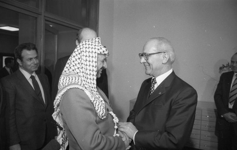 Berlin, Yasser Arafat, Erich Honecker ADN-ZB Mittelstädt 10.3.82, Berlin: Arafat-Besuch Herzlich begrüßte Erich Honecker im Haus des ZK den PLO-Vorsitzenden, Yasser Arafat, am zweiten Tag seines offiziellen Freundschaftsbesuchs in der DDR. Abgebildete Personen: Arafat, Yasser: 1929-2004; Abu Ammar, auch Jassir Arafat, PLO, Präsident der palästinensischen Autonomiegebiete, Friedensnobelpreis 2004, Palästina# (GND 118503766) Honecker, Erich: Staatsratsvorsitzender, Generalsekretär des ZK der SED, DDR (GND 118553399)